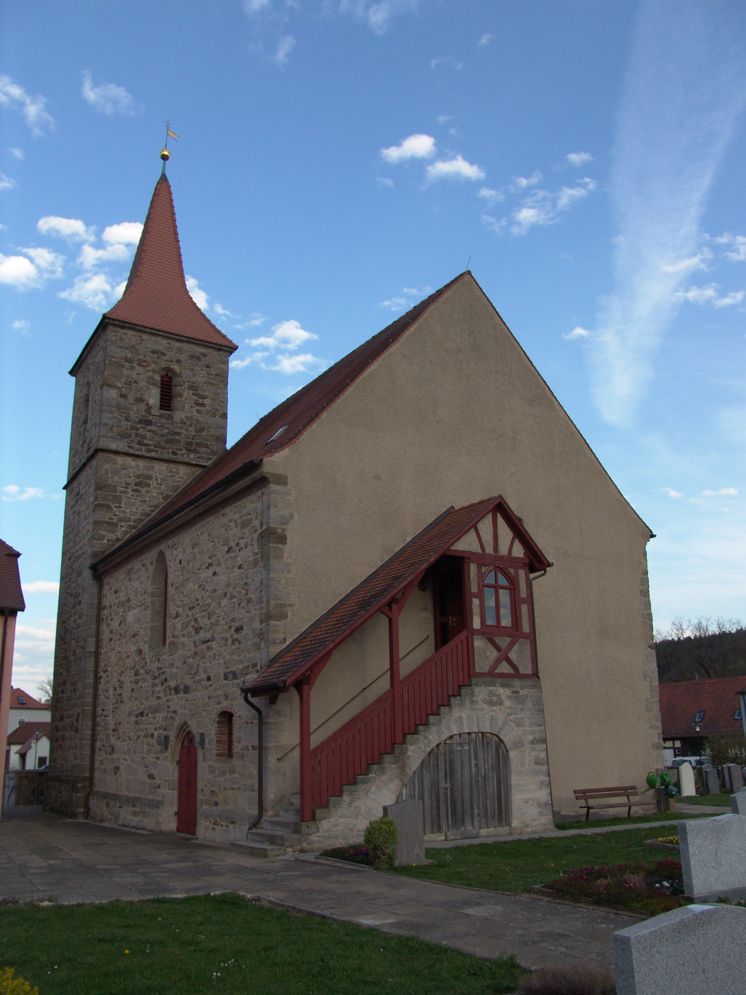 evang.-luth. Kirche St. Stephan in Breitenau